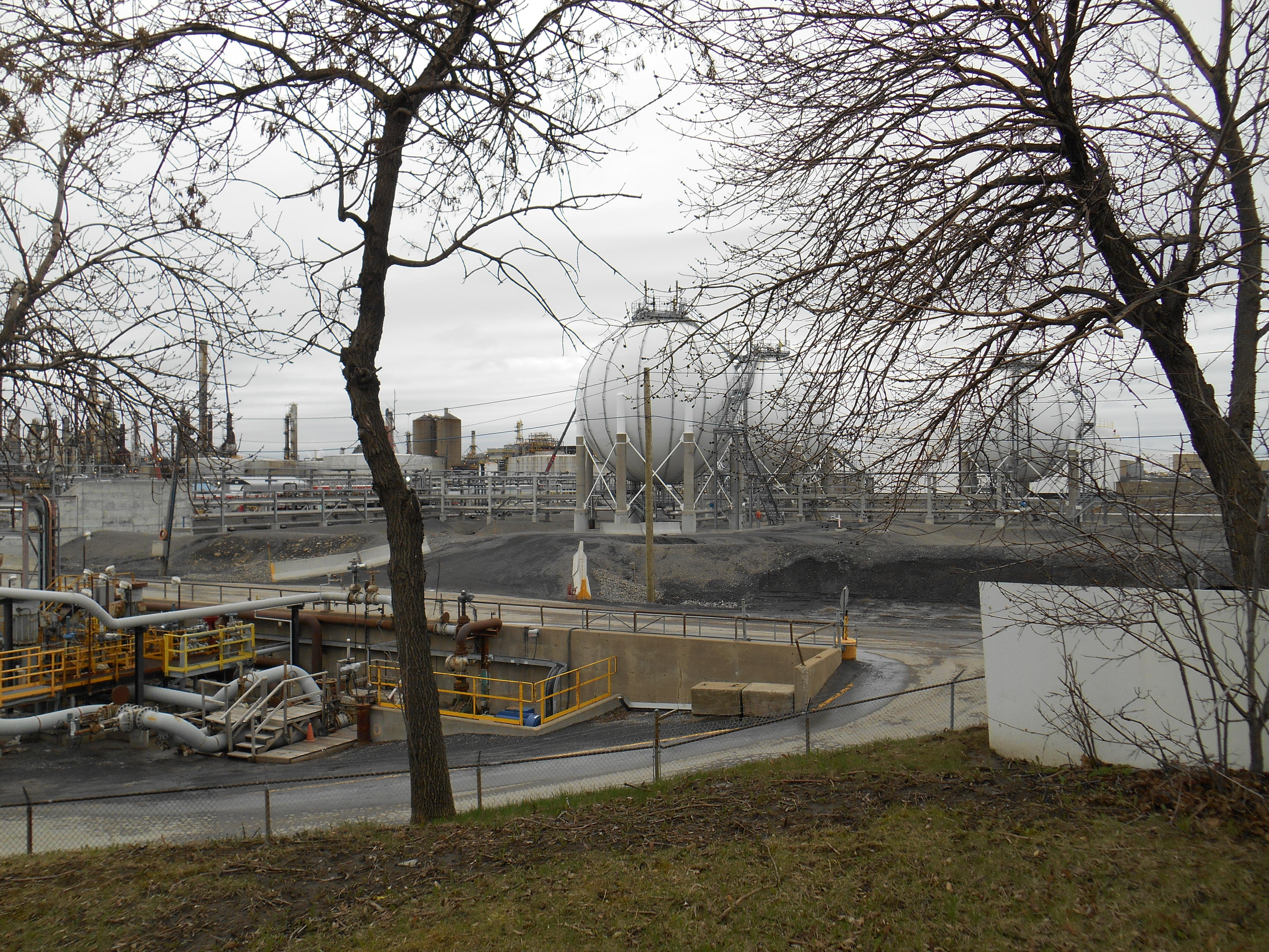 Suncor Énergie possède une raffinerie à Montréal-Est produisant 137 000 barils par jour d’essence, de distillats, de bitume, de mazout lourd, de produits pétrochimiques, de solvants et de charge d’alimentation pour lubrifiants.